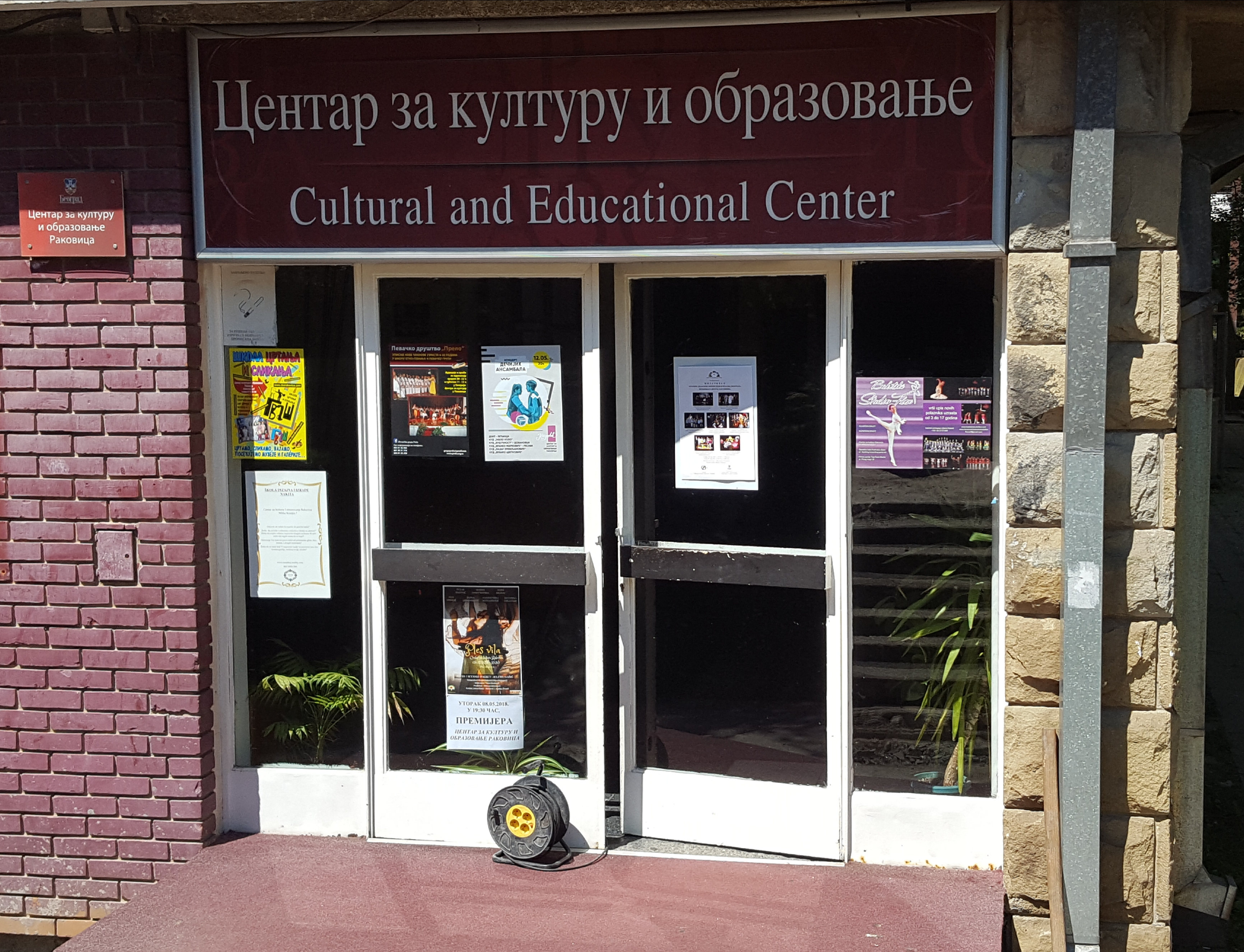 Zgrada Centra za kulturu i obrazovanje u Rakovici